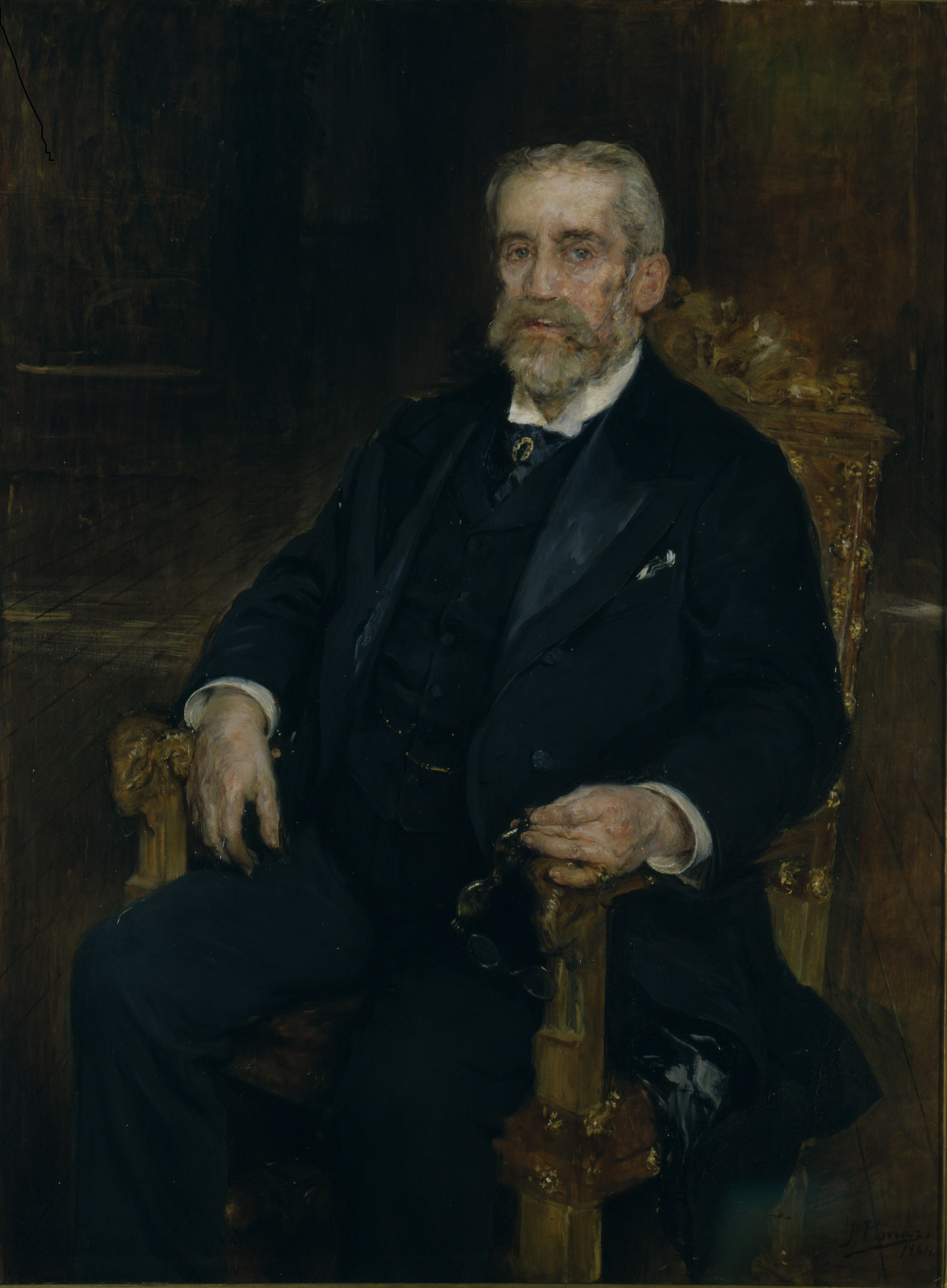 Retrato del politico español Francisco Romero Robledo (1838-1906)